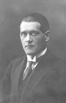 Friedrich Puksoo, eesti raamatuteadlane ja bibliograaf